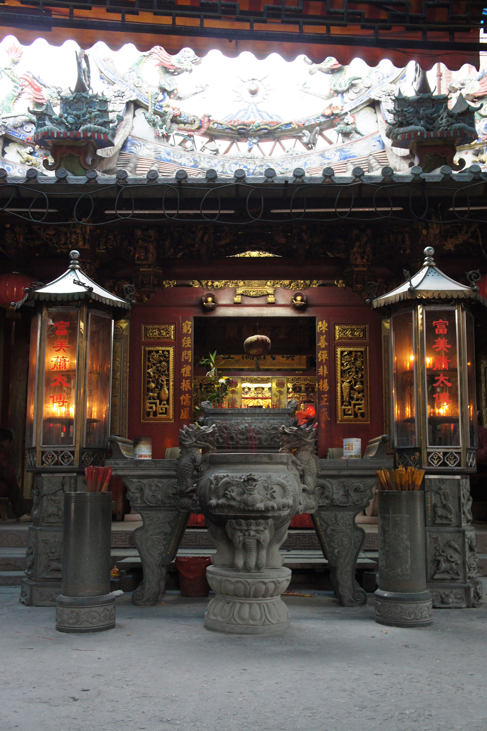 泉州富美宮照片